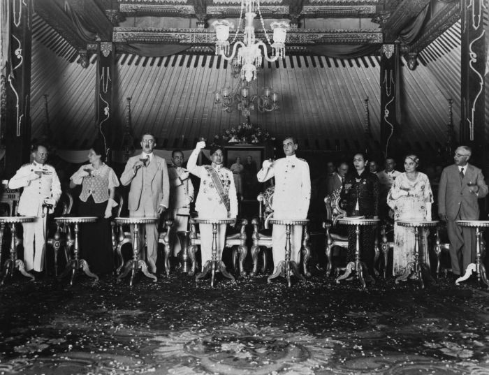 Foto. Gouverneur Bijleveld heft het glas met Sultan Hamengkoe Boewono VIII tijdens een bezoek aan de kraton in Jogjakarta